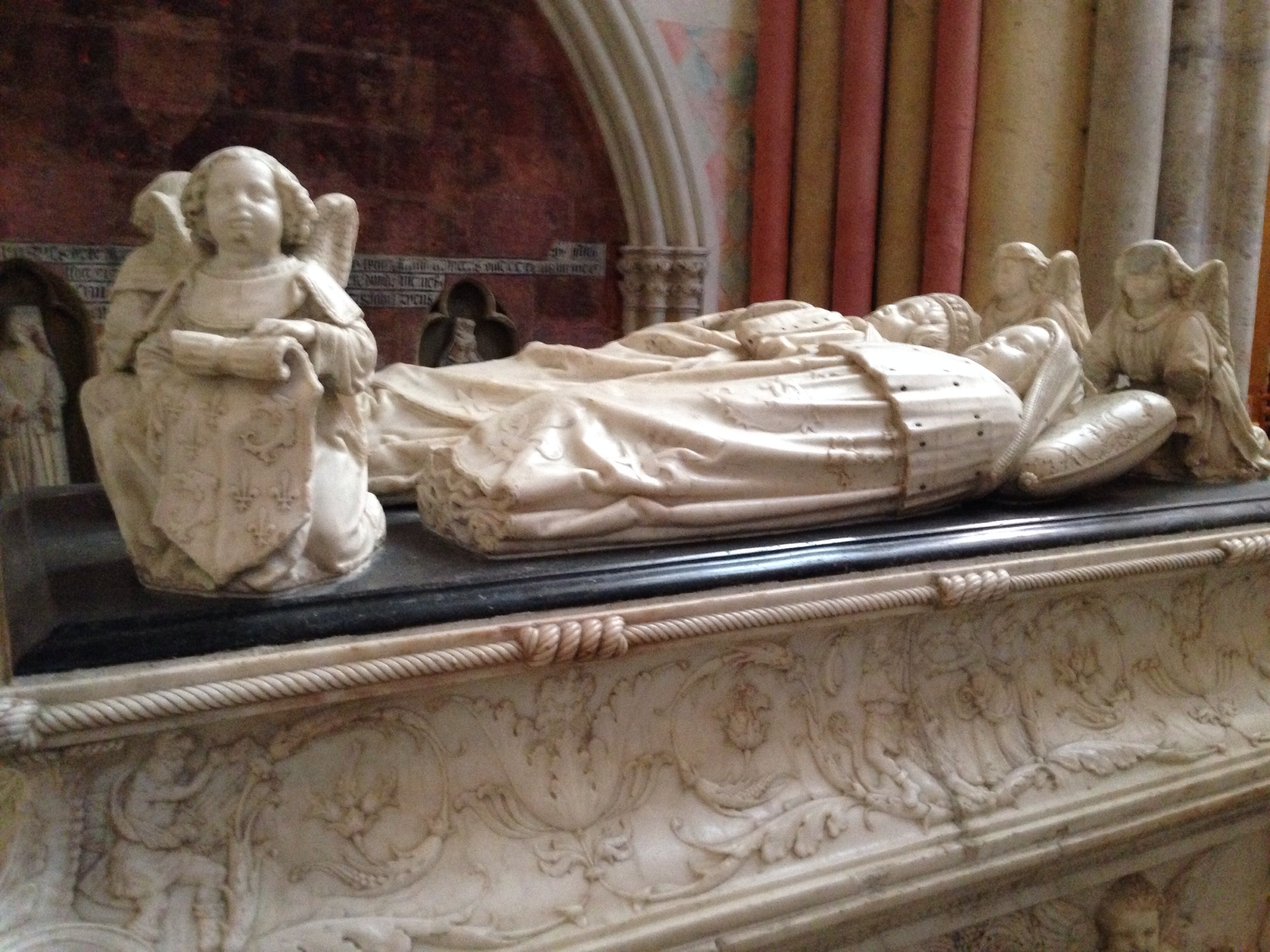 Gisants des deux fils de Charles VIII et Anne de Bretagne, morts en bas âge.